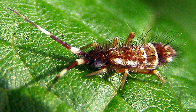 Springschwanz Collembola. Orchesella flavescens.